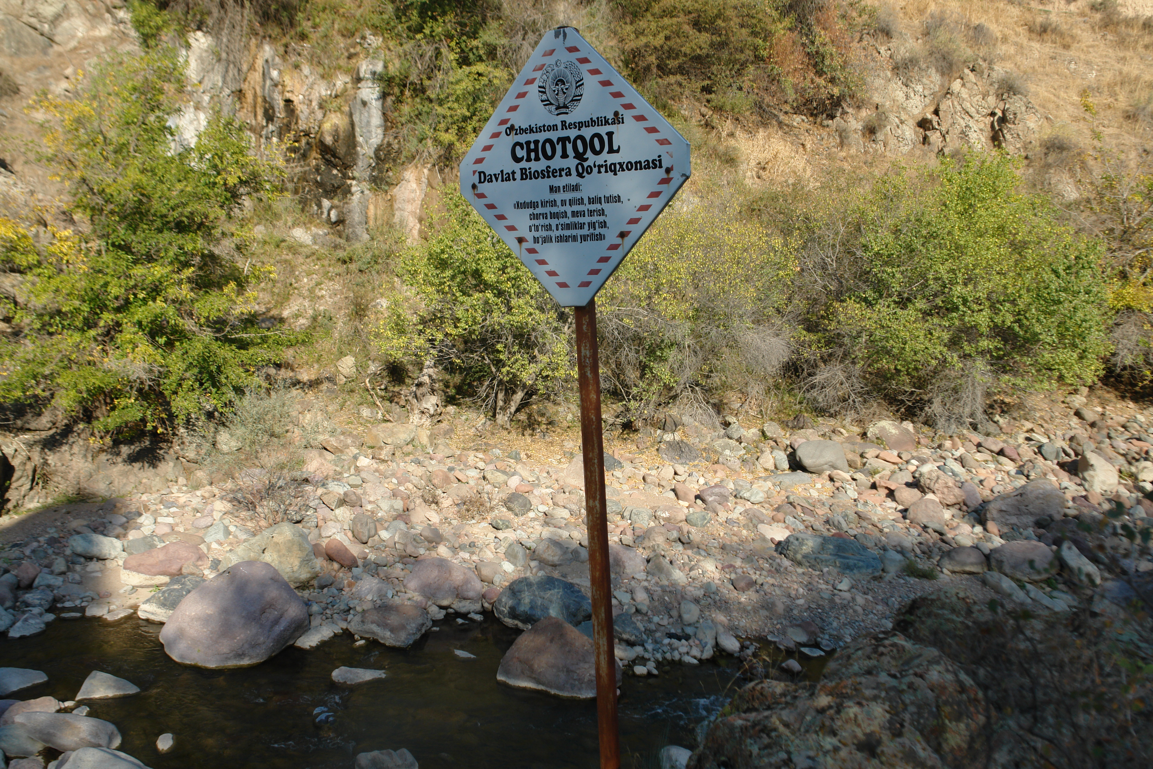 Объявление о входе в Чаткальский заповедник